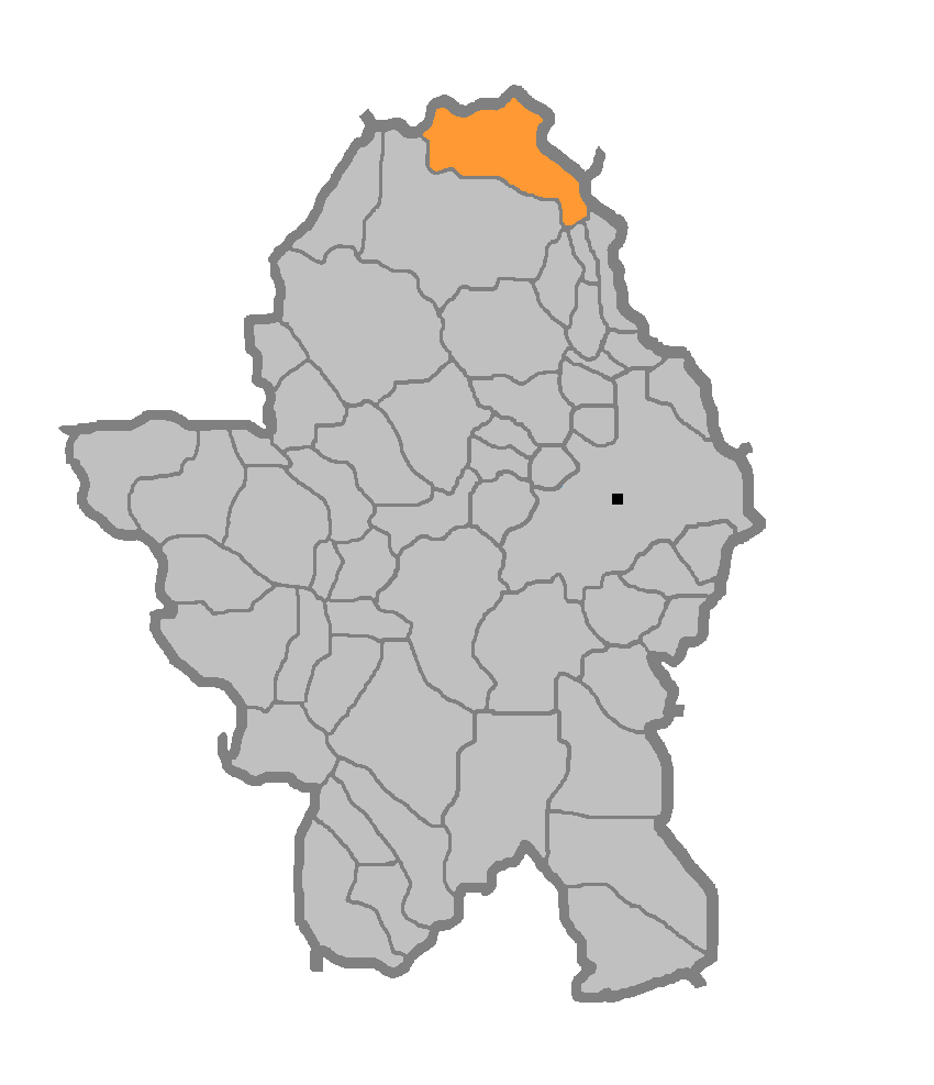 Мјесна заједница Шимићи